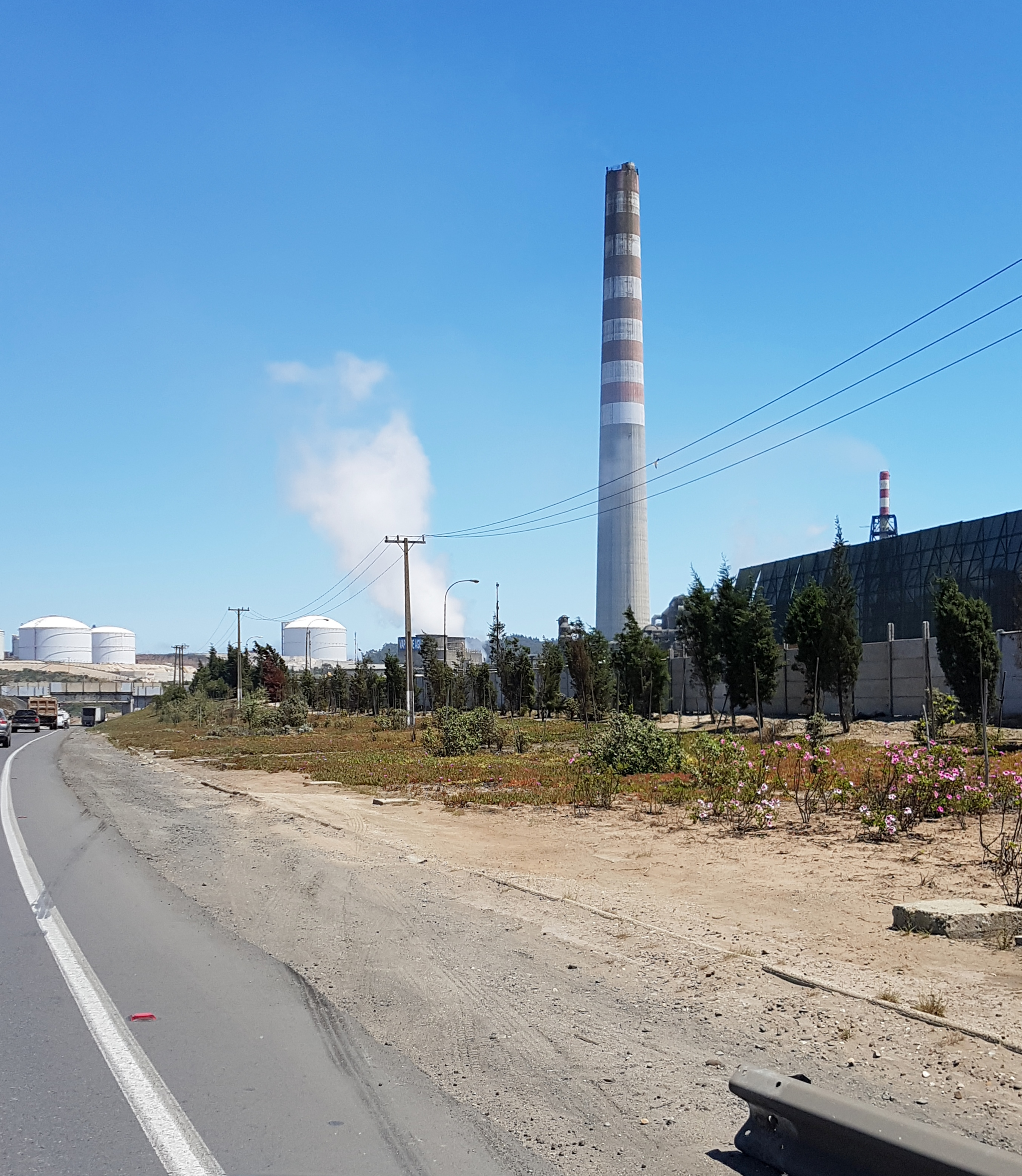 Refinería y fundición de La Ventanas, Codelco, región de Valparaíso, Chile.